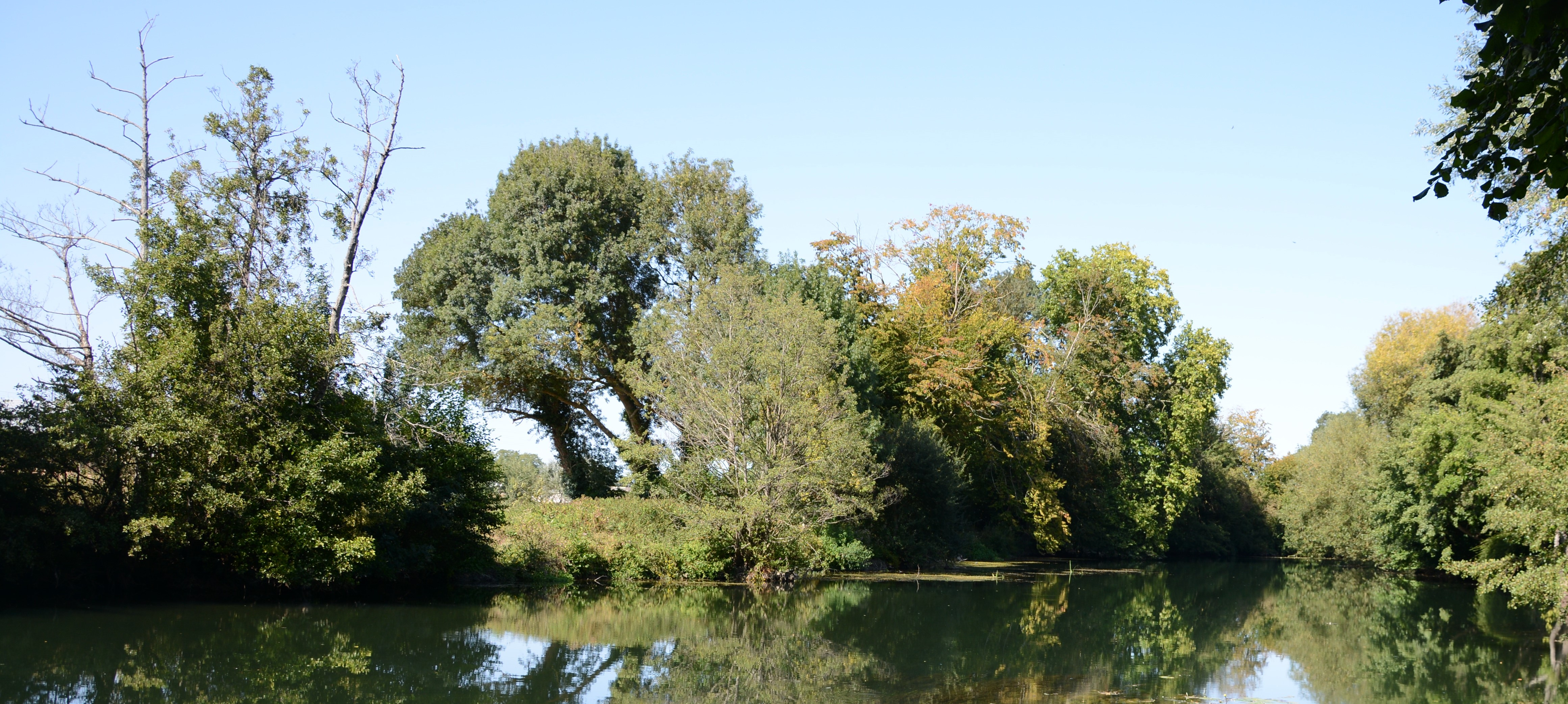 Photo prise depuis le terrain municipal ouvert au public à Lessart, Buxerolles 86180